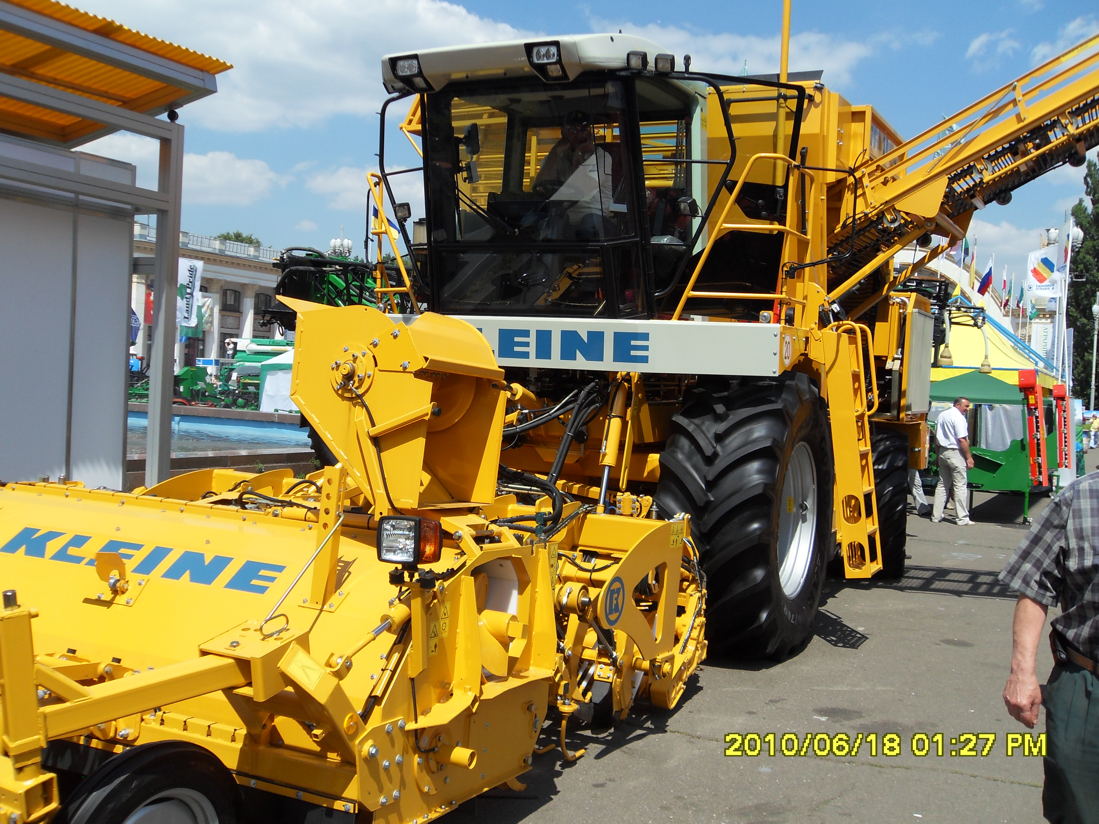 Буряковий комбайн